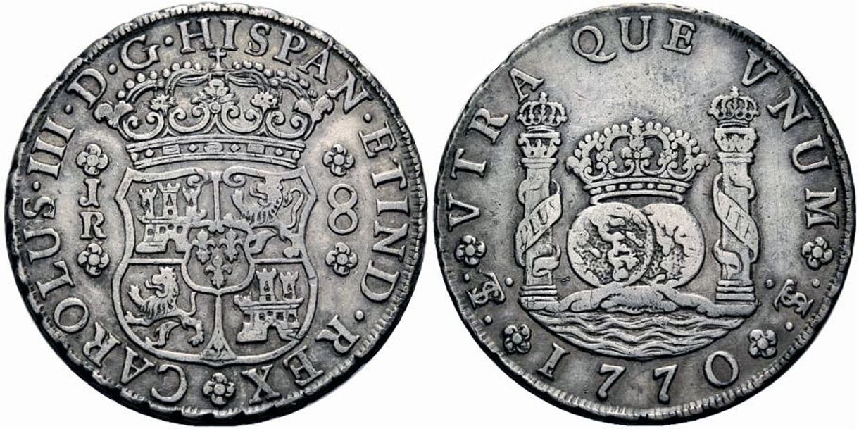 Moneda acuñada entre 1767 y 1773 en la Ceca de Potosí, durante el proceso de construcción de su nuevo edificio.